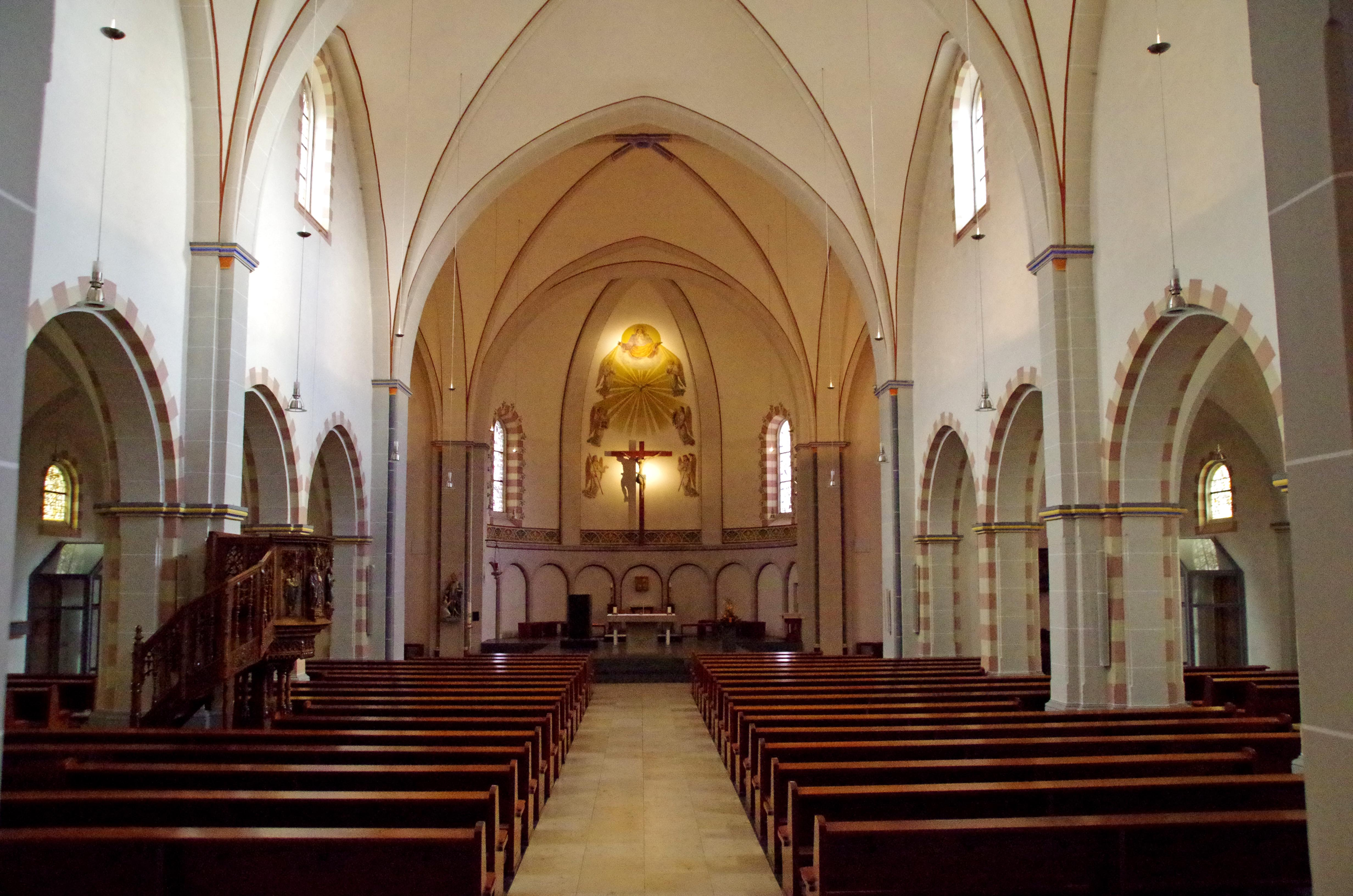 St. Medardus (Bendorf), Blick in die katholische Pfarrkirche